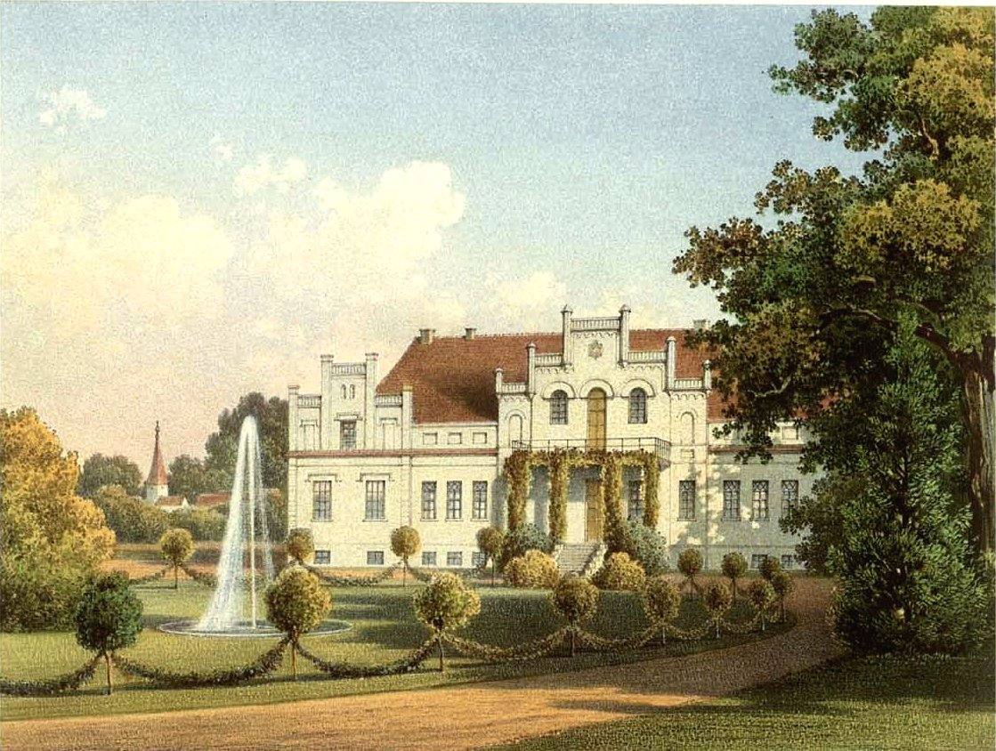 Pałac w Wejherowie.